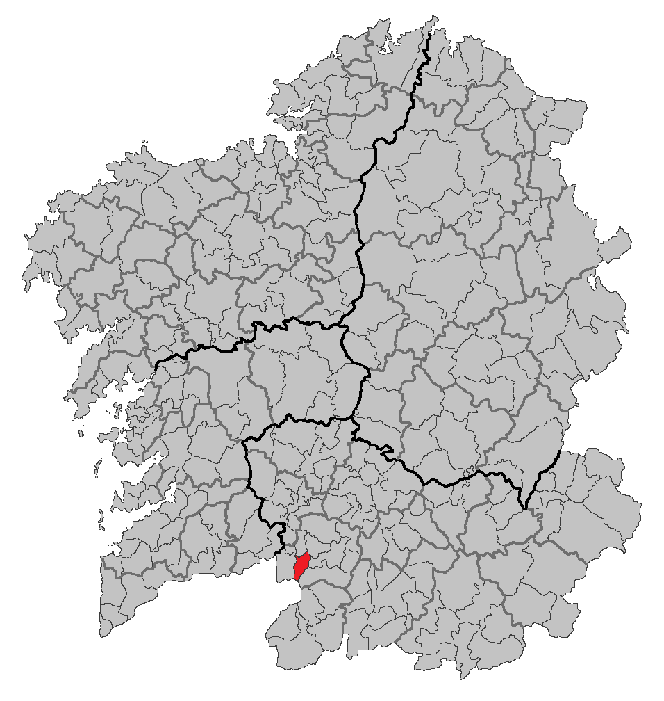 Mapa coa localización do concello de Quintela de Leirado.